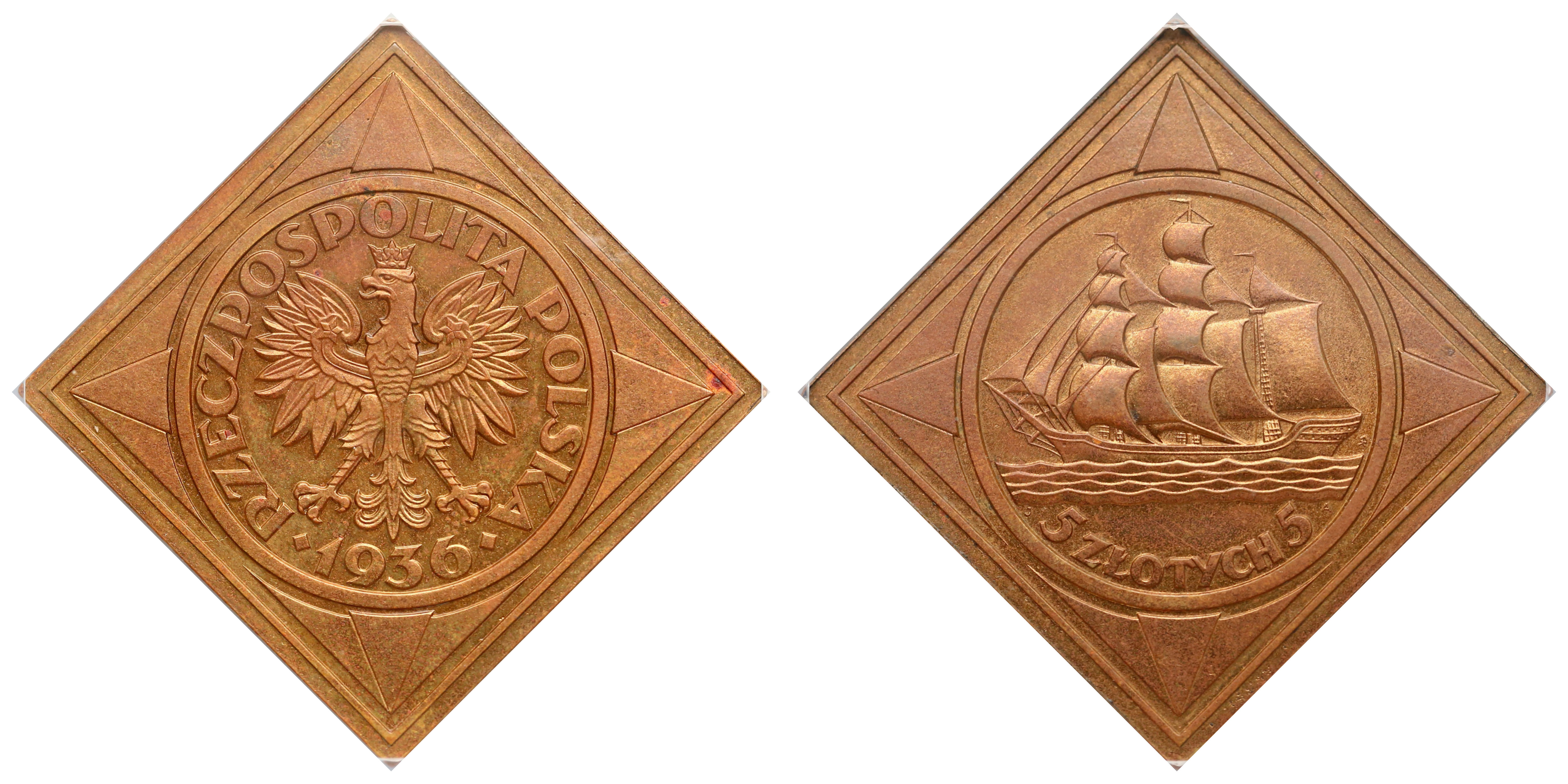 Klipa 5 złotych 1936 Żaglowiec brąz